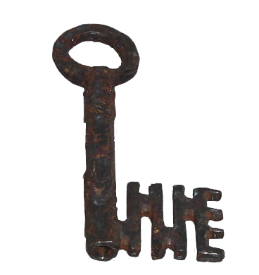 Clé forée en fer, fin du XIIe siècle et début du XIIIe siècle, découvert à Château Lastours en Aude en France